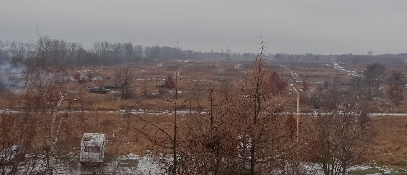 Garnizonowy Ośrodek Szkolenia, 2015 r. 3 batalion piechoty zmotoryzowanej podczas szkolenia